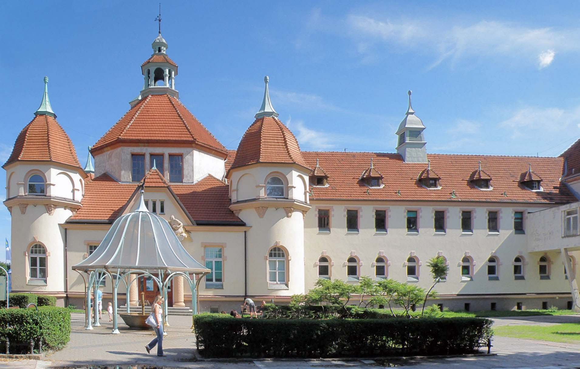 Sopot Dolny, pl. Zdrojowy - Zakład Balneologii, 1903-1904